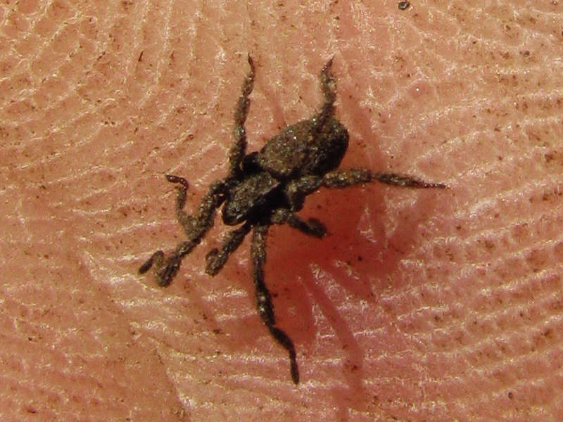 Anelasmocephalus cambridgei. Location: The Netherlands - Winterswijk - Willinks Weust Heksenbos